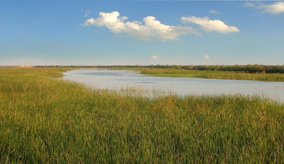 الأهوار في جنوب العراق The marshes in southern Iraq الشجرة التين والأغنام